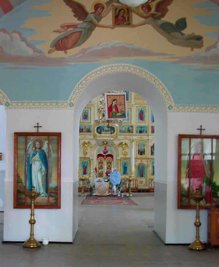 Свято-Покровський_кафедральний_собор_Охтирка_усередині.jpg: Інтер'єр Свято-Покровського кафедрального собору в Охтирці (серпень 2007)